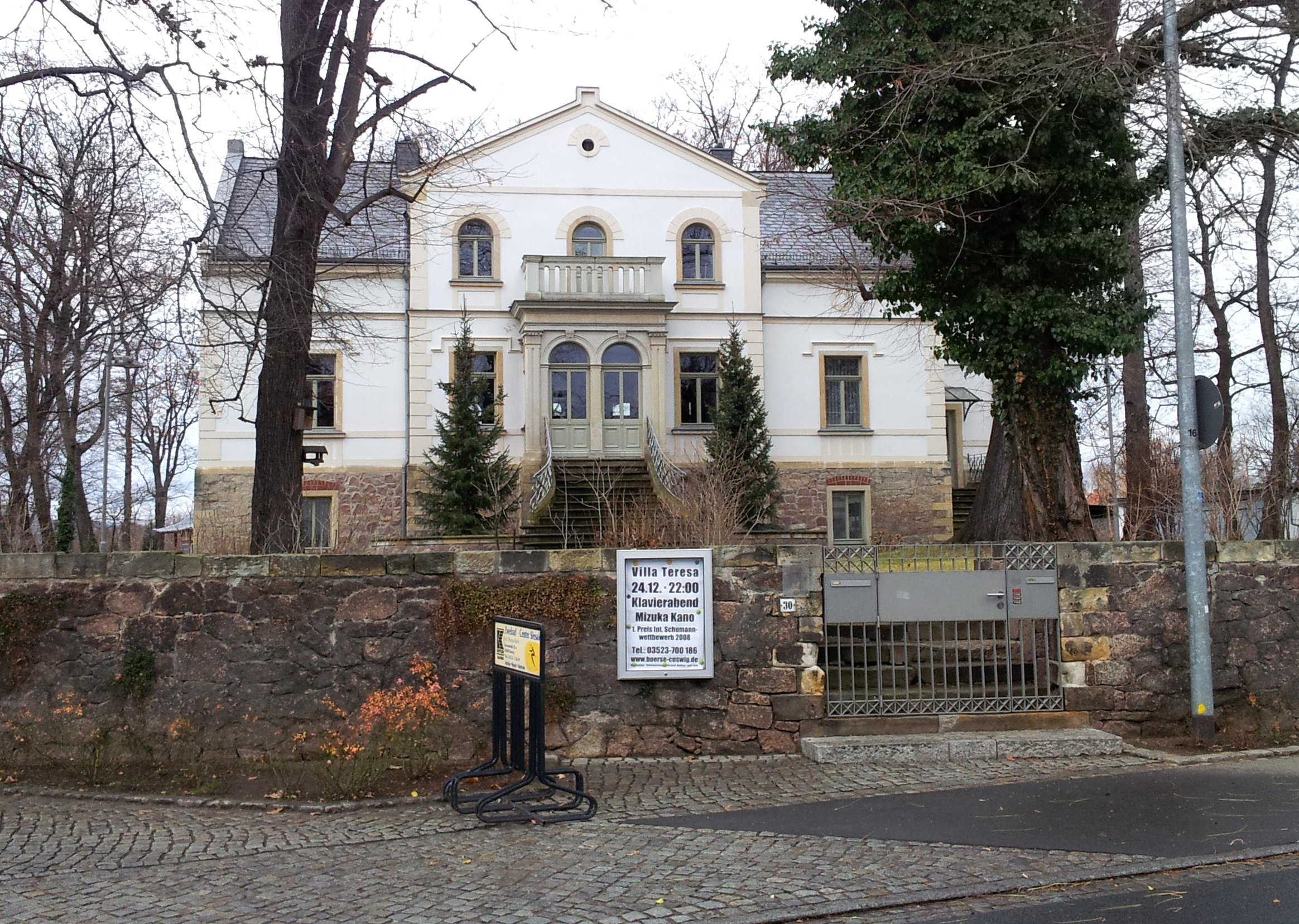 Villa Teresa in Kötitz, einem Ortsteil von Coswig (Sachsen)